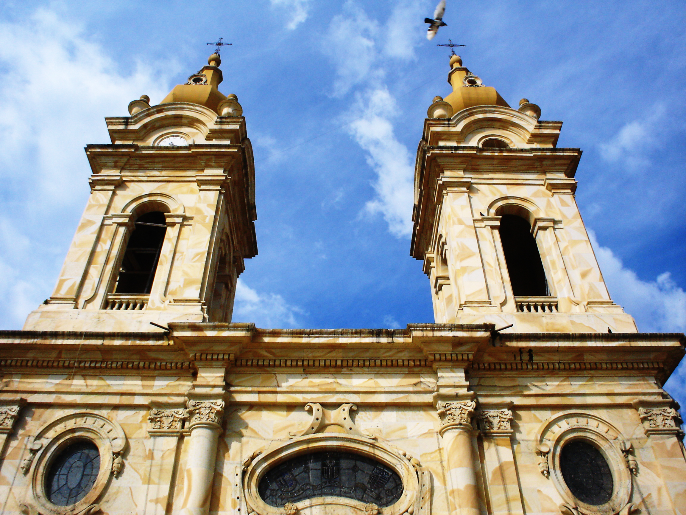 Frontis de la Iglesia de Nuestra Señora de La Candelaria